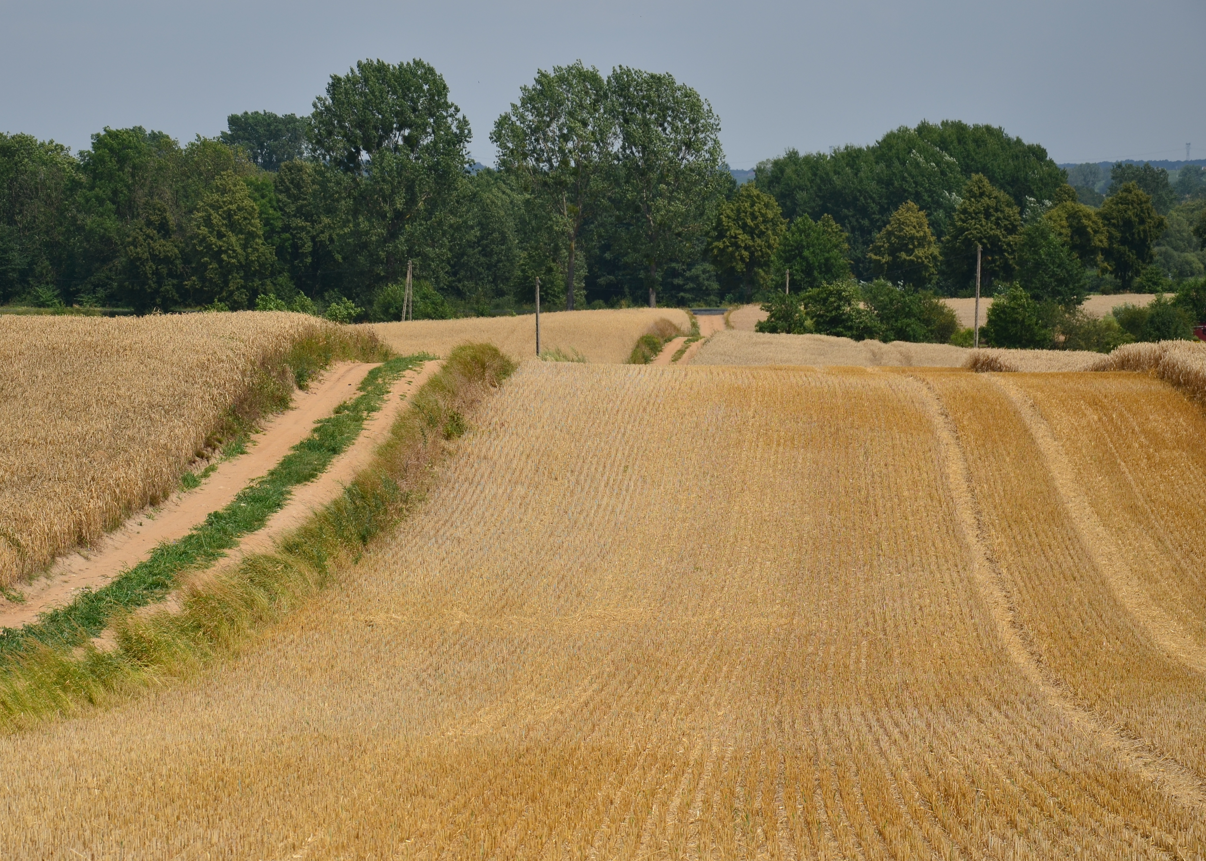 Obszar Chronionego Krajobrazu Drumliny Zbójeńskie